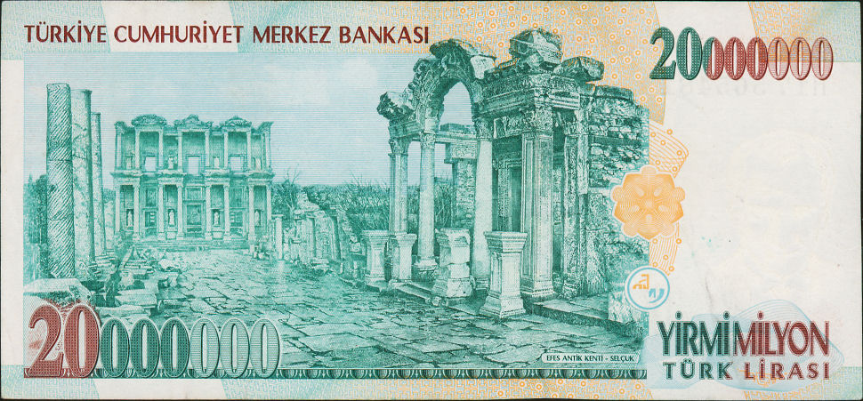 E7 serisi 20.000.000 TL'nin arka yüzü